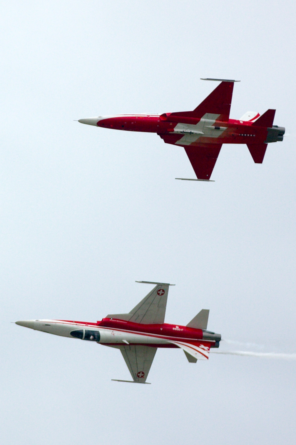 Patrouille Suisse at ILA 2010